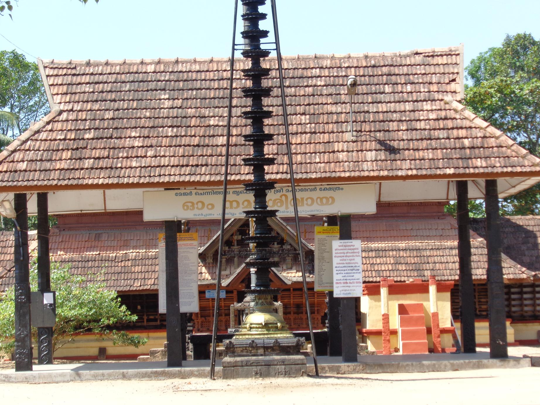 thrpperunthura mahadeva temple, chennithala, mavvelikara